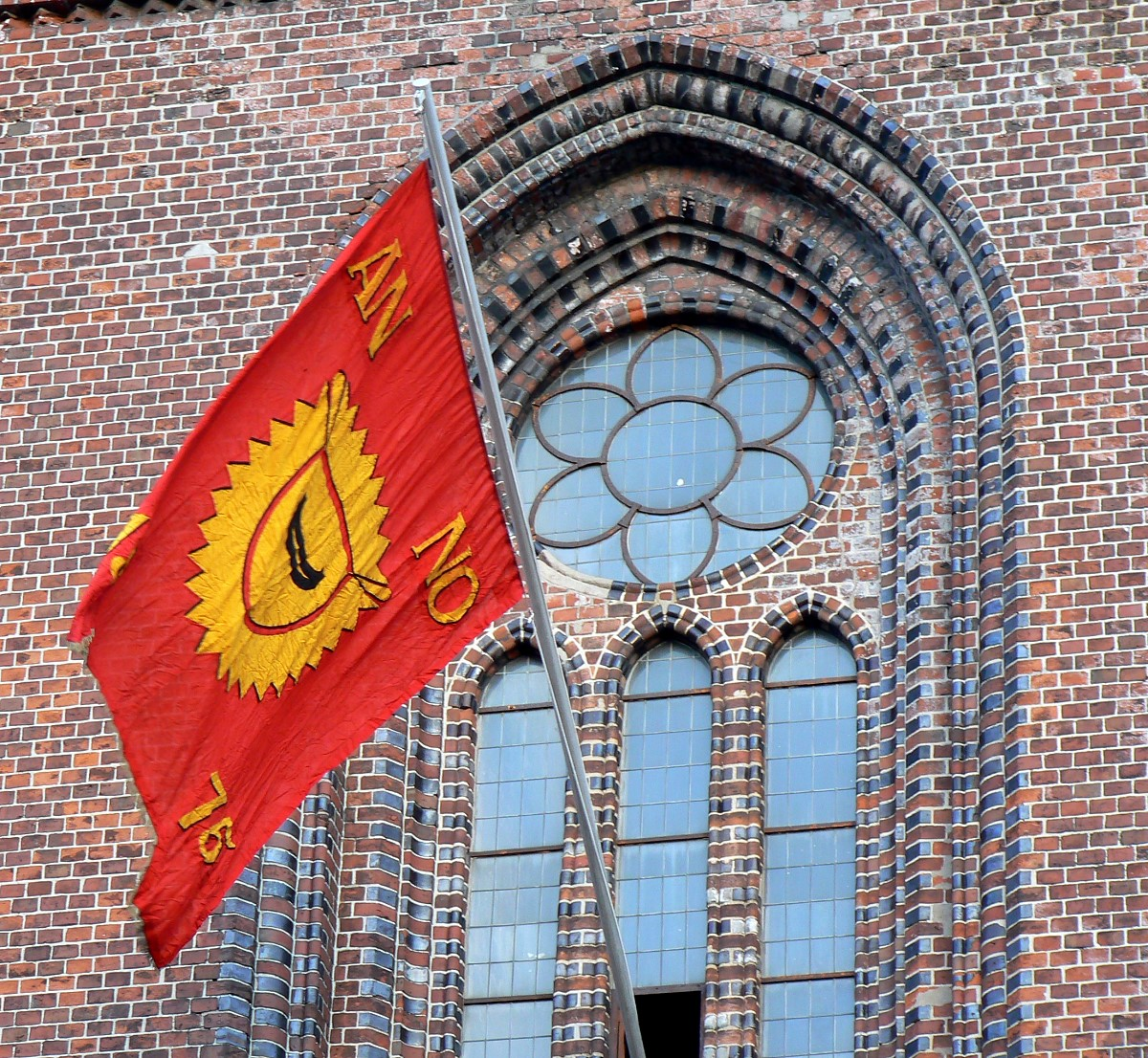 Die Fahne Asmus Büx an der Nikoleikirche in Kiel während des Kieler Umschlags.